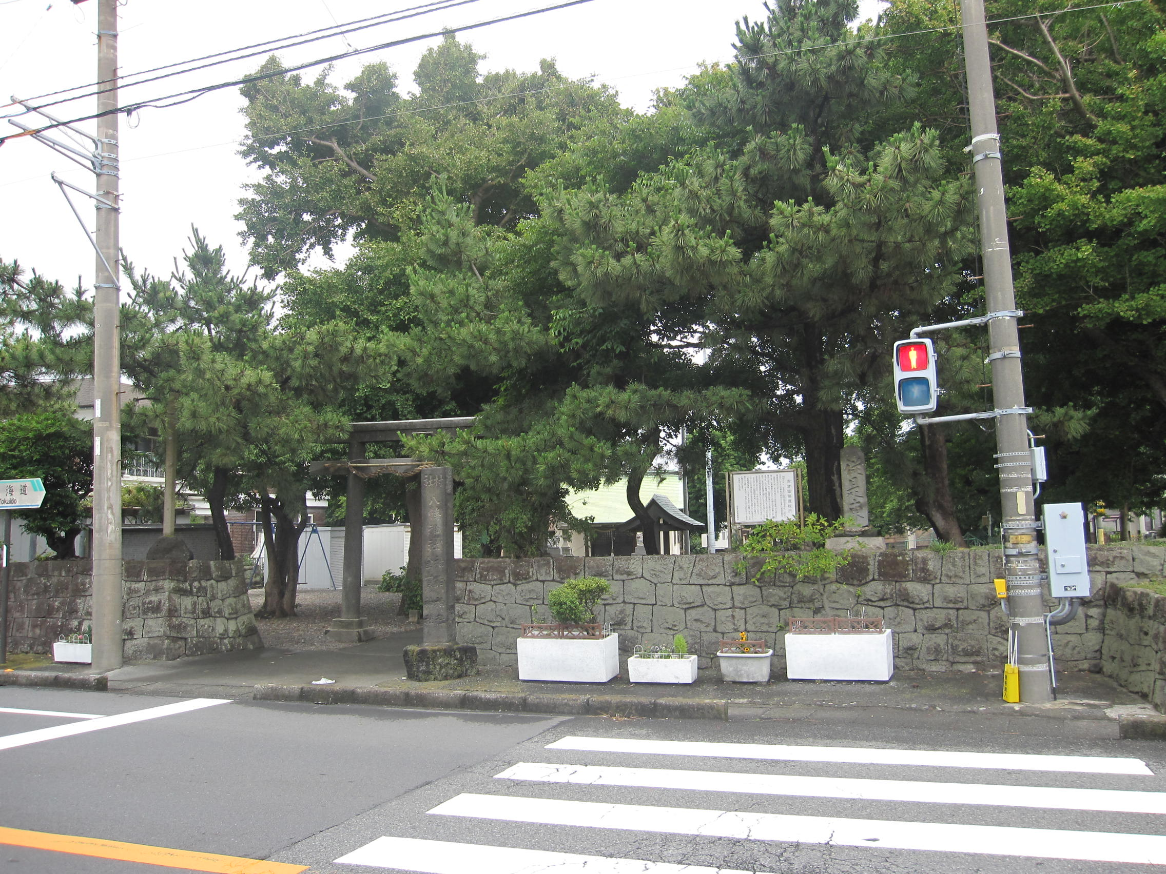 静岡県沼津市。沼津藩領の西端にある。